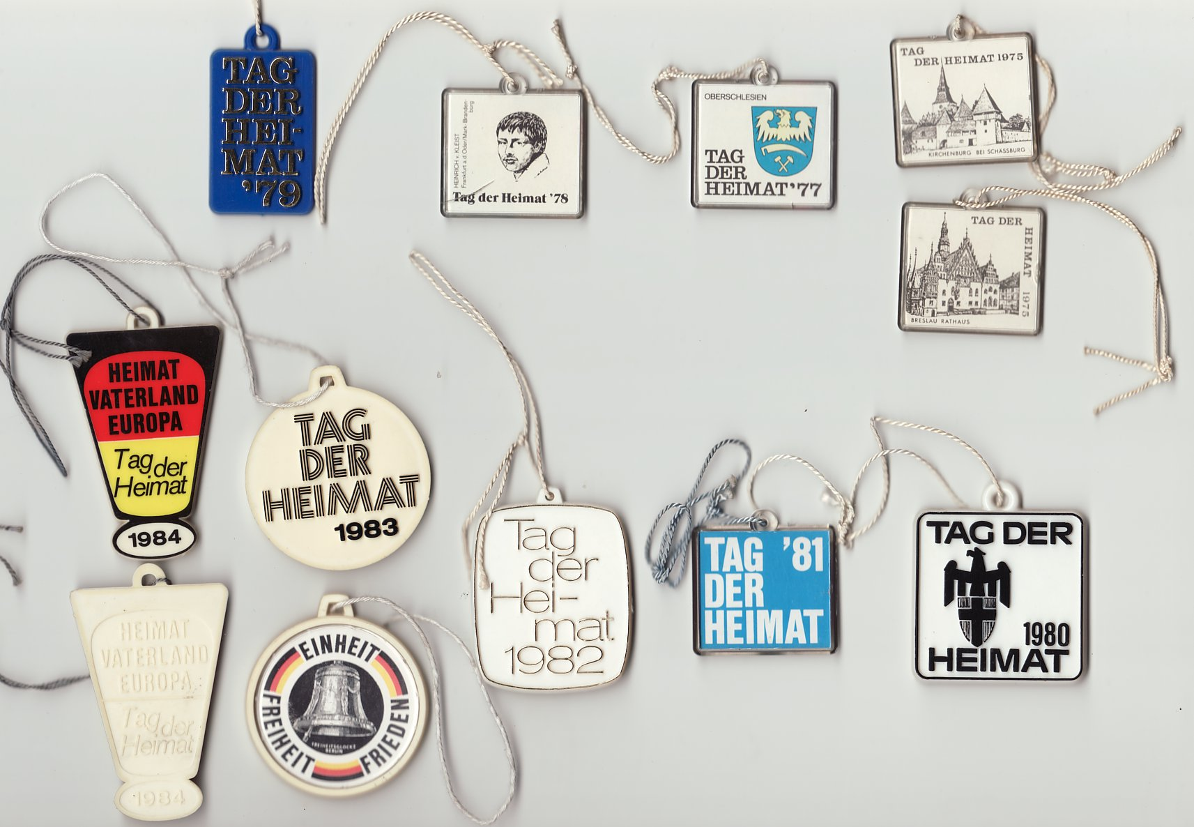 Anhänger vom Tag der Heimat des Bundes der Vertriebenen von 1975-1984.